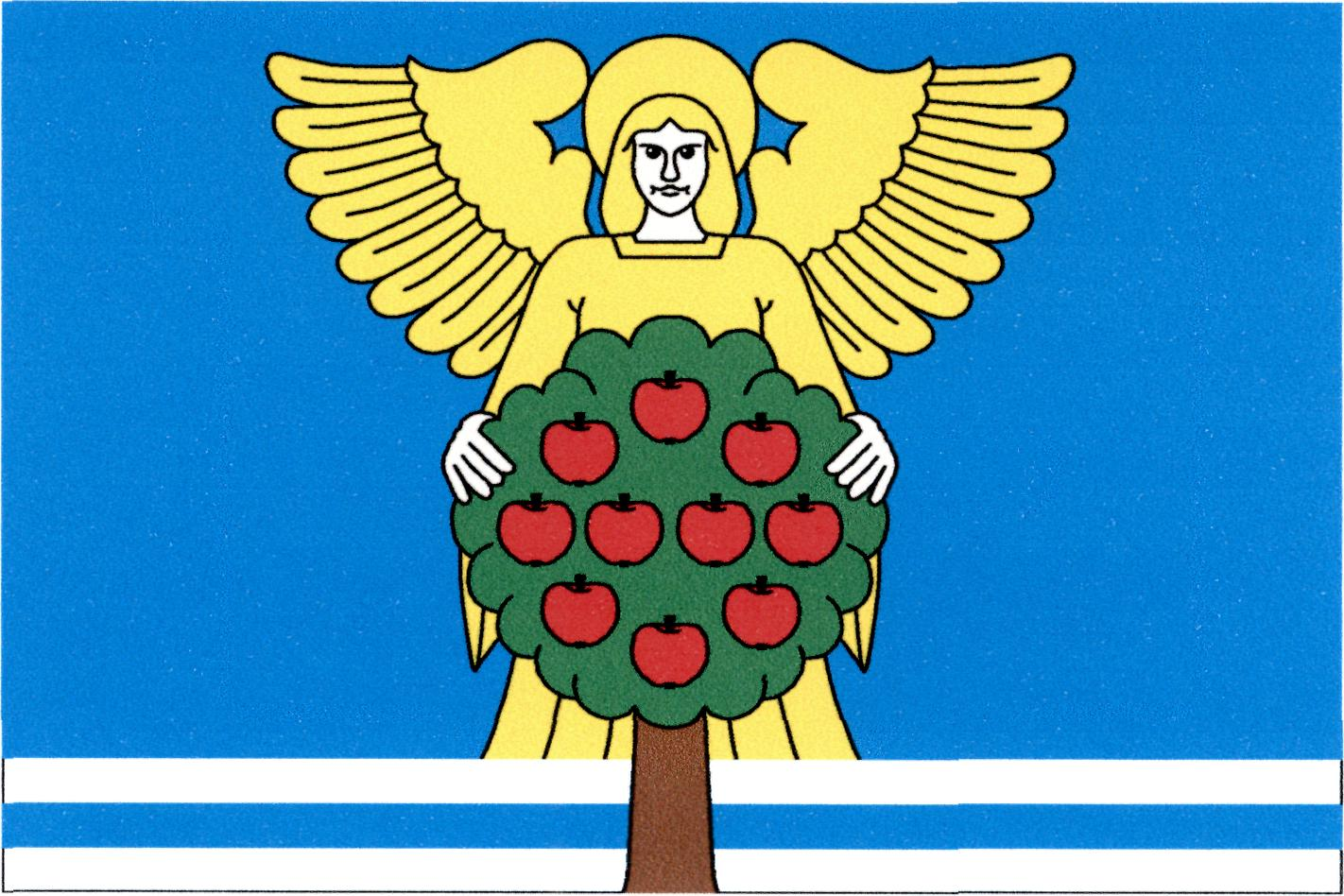 Vlajka obce Říkov